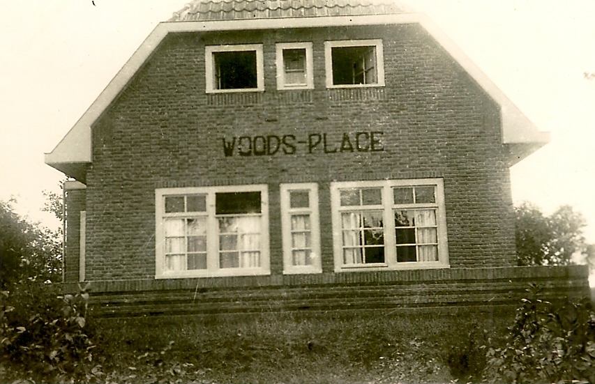 De boerderij Woods-Place te Mariahout